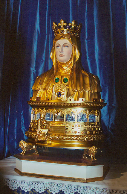 Relicario de Santa Marta del siglo XIX, copia del relicario del siglo XV, en la Cathédrale Sainte-Marthe de Tarascon